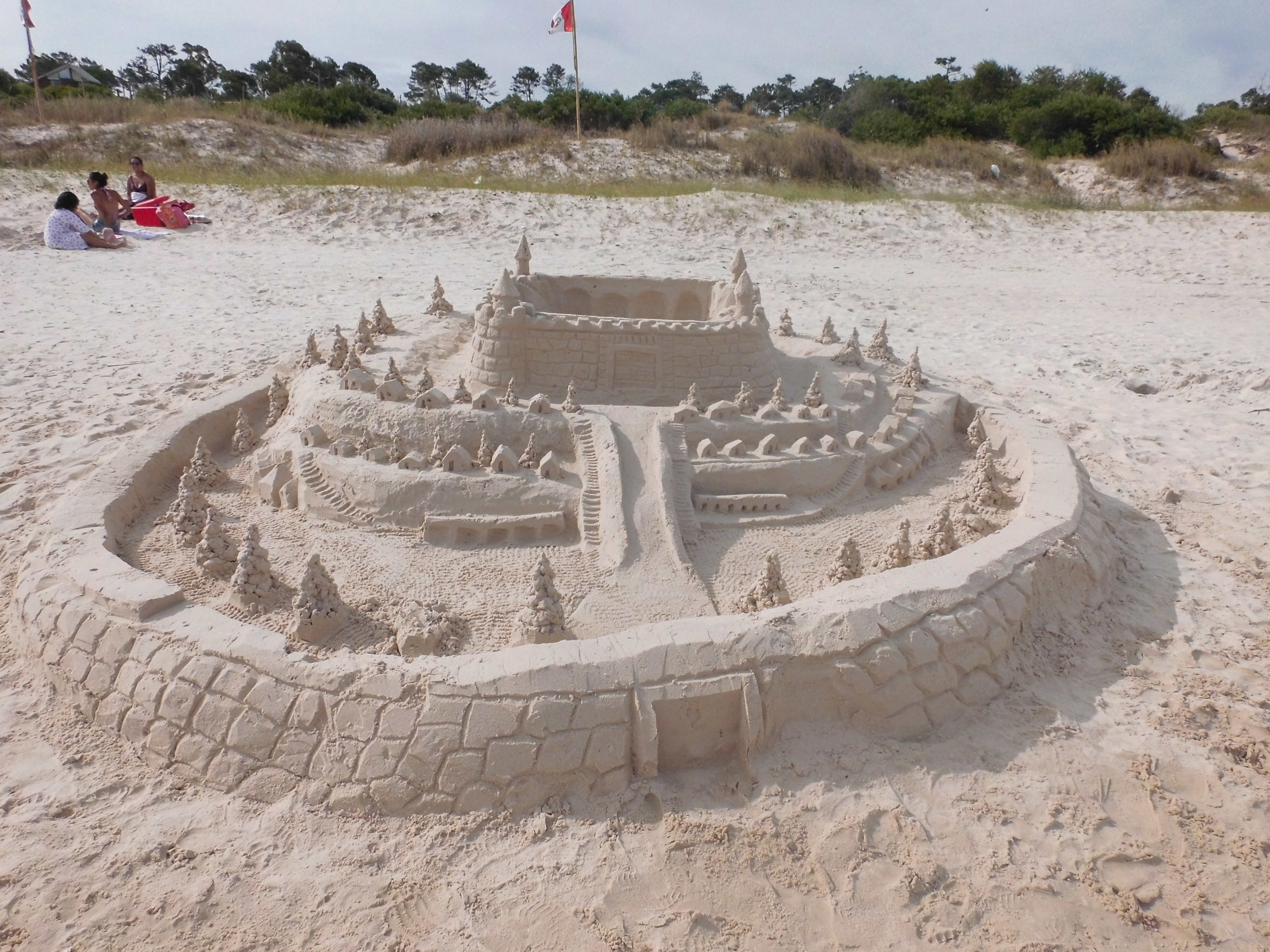 Castillo de arena creado en el segundo concurso internacional de esculturas de arena en Marindia, Uruguay